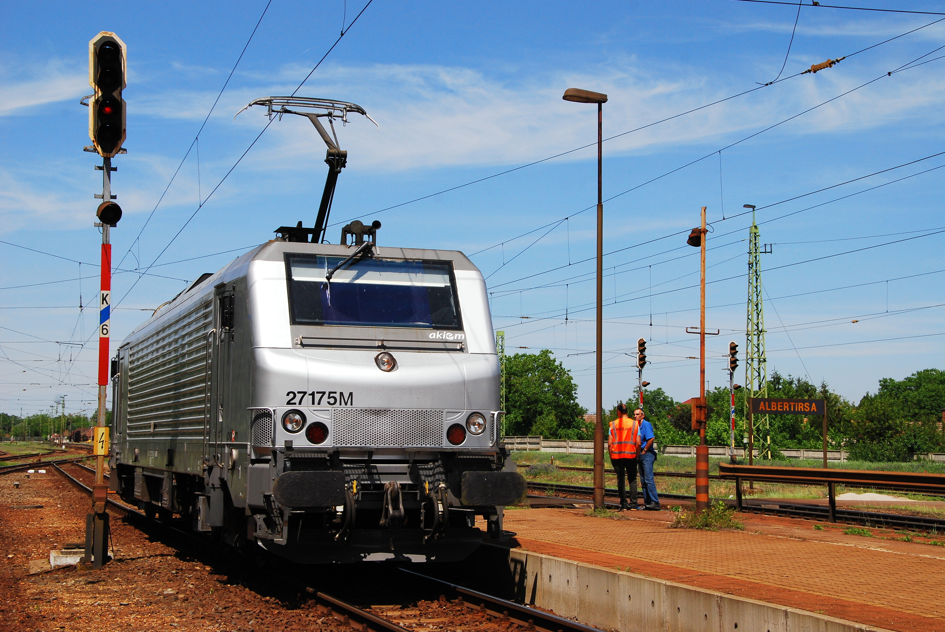 The 27175 during the tests in Hungary